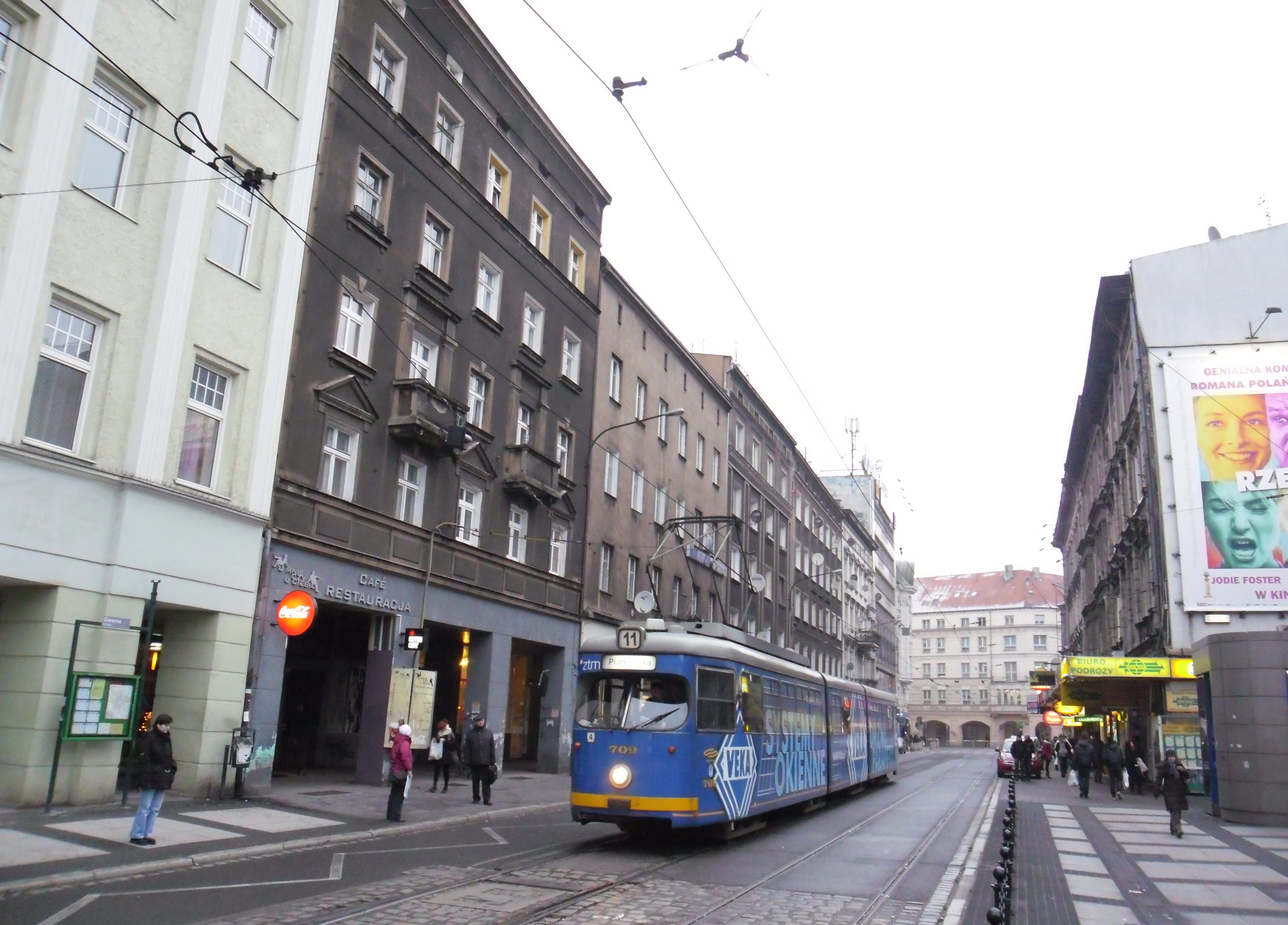 ul. Gwarna, Poznań.